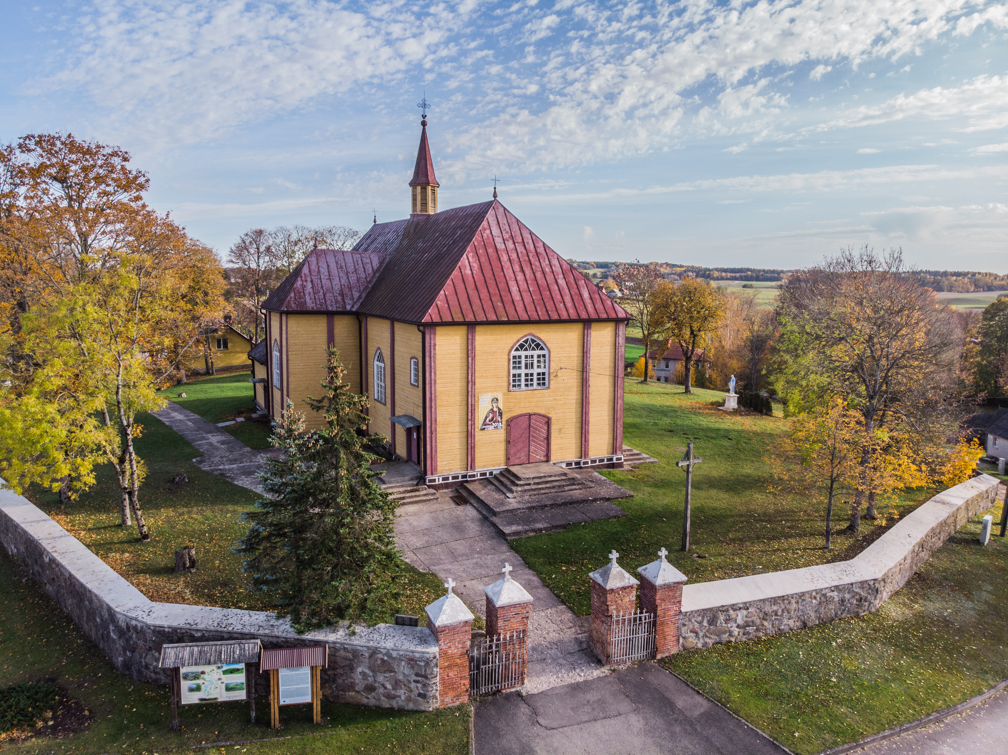 Vartai į Luokės Visų Šventųjų bažnyčios statinių kompleksą